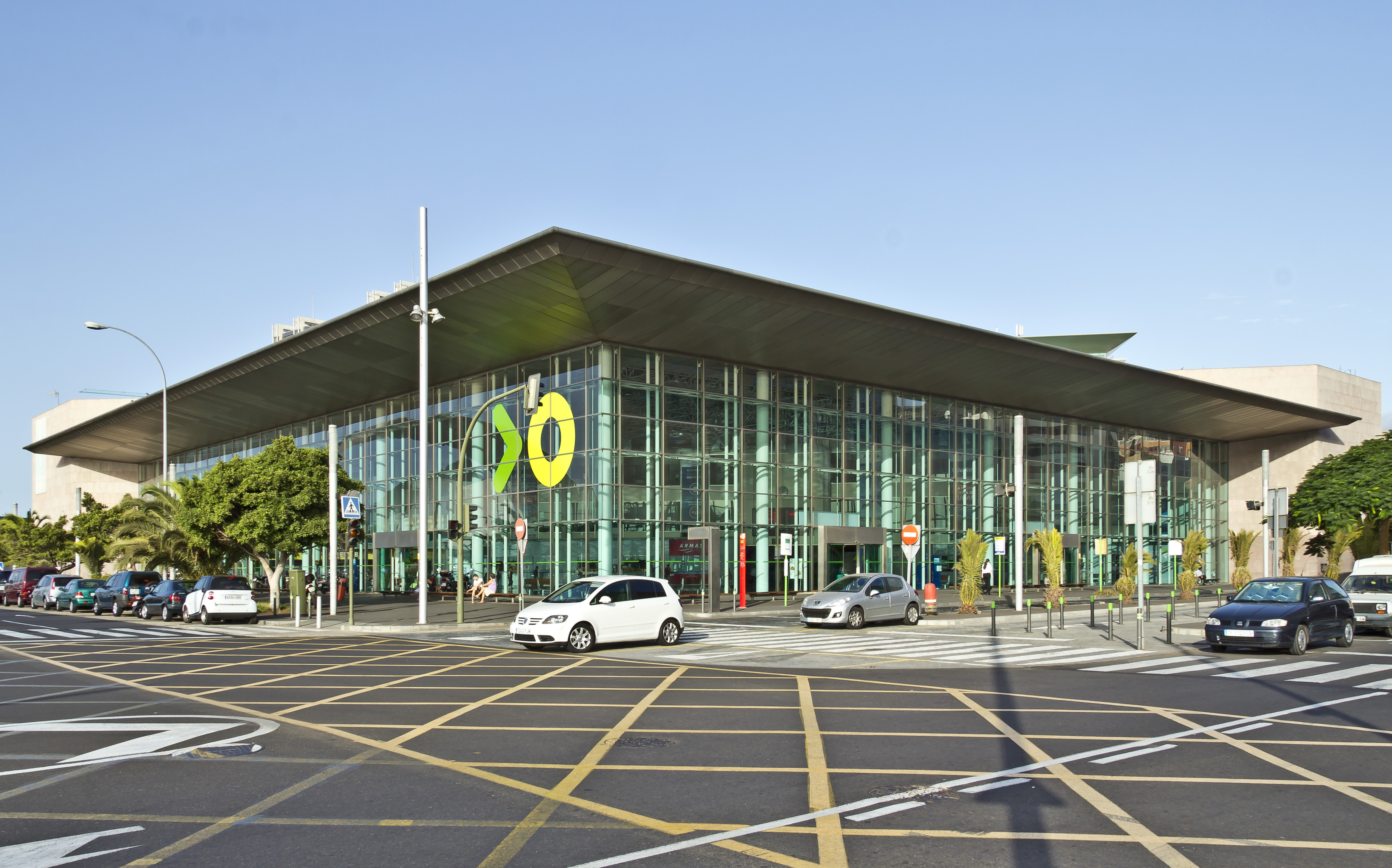 Eingangshalle des Busbahnhofes in Santa Cruz de Tenerife